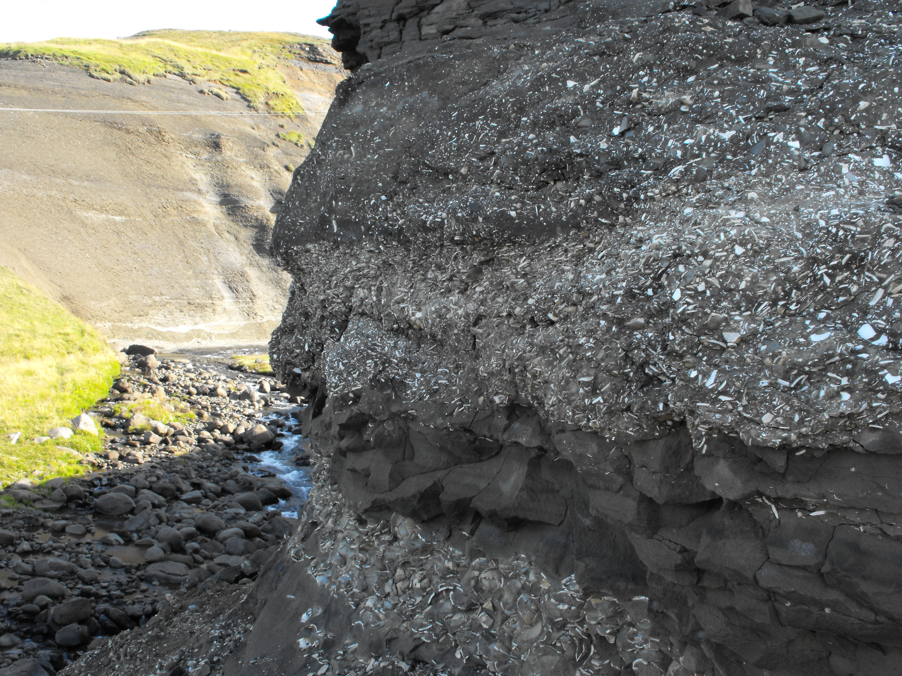 Fossils at Ytri tunga cliffs - Iceland